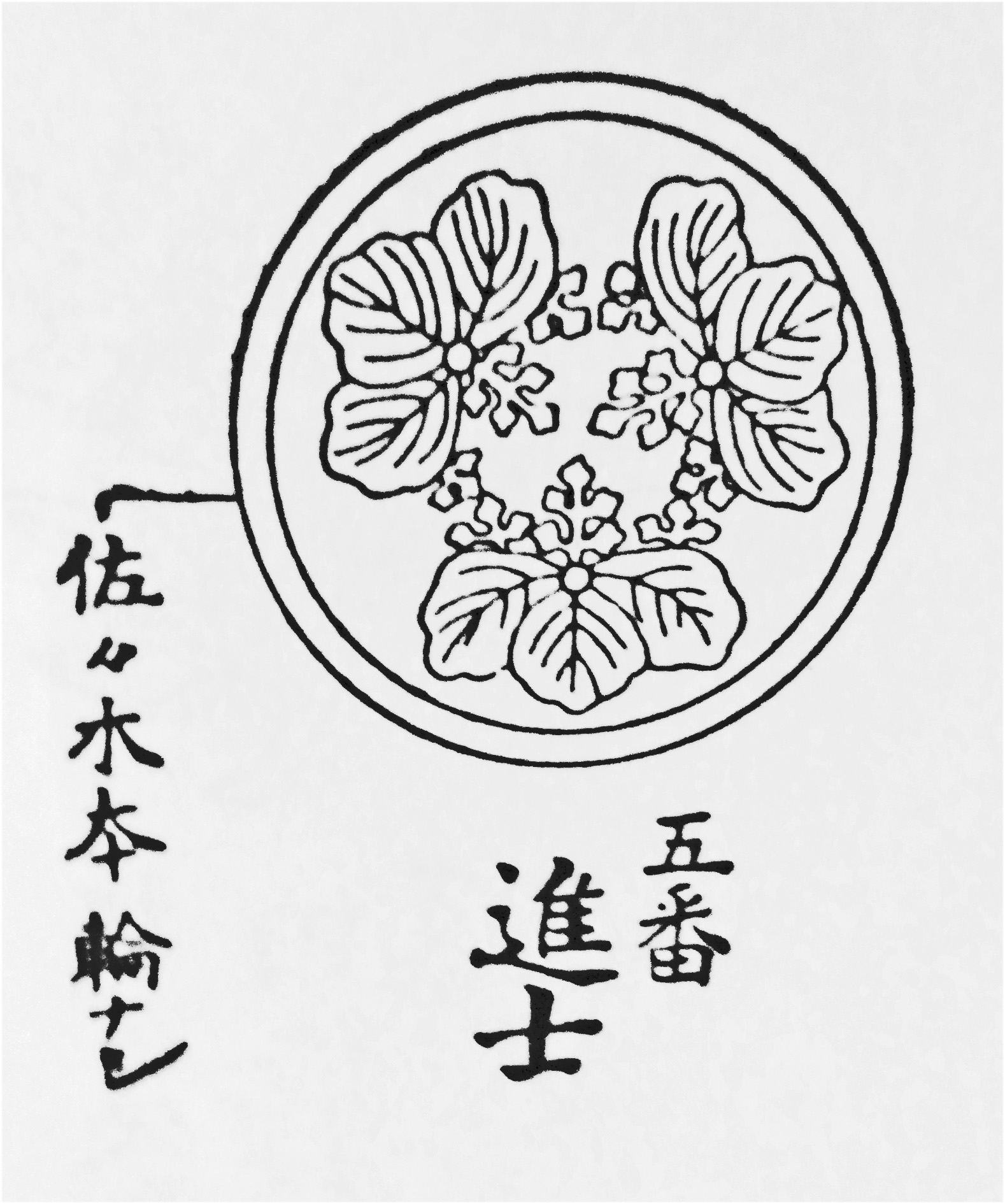 『見聞諸家紋』に載る進士氏の家紋。紋の名称には言及はないが、「丸に頭合わせ三つ五三桐」という桐紋の一種である。『見聞諸家紋』掲載の家紋はこの図のように線描で描かれる。